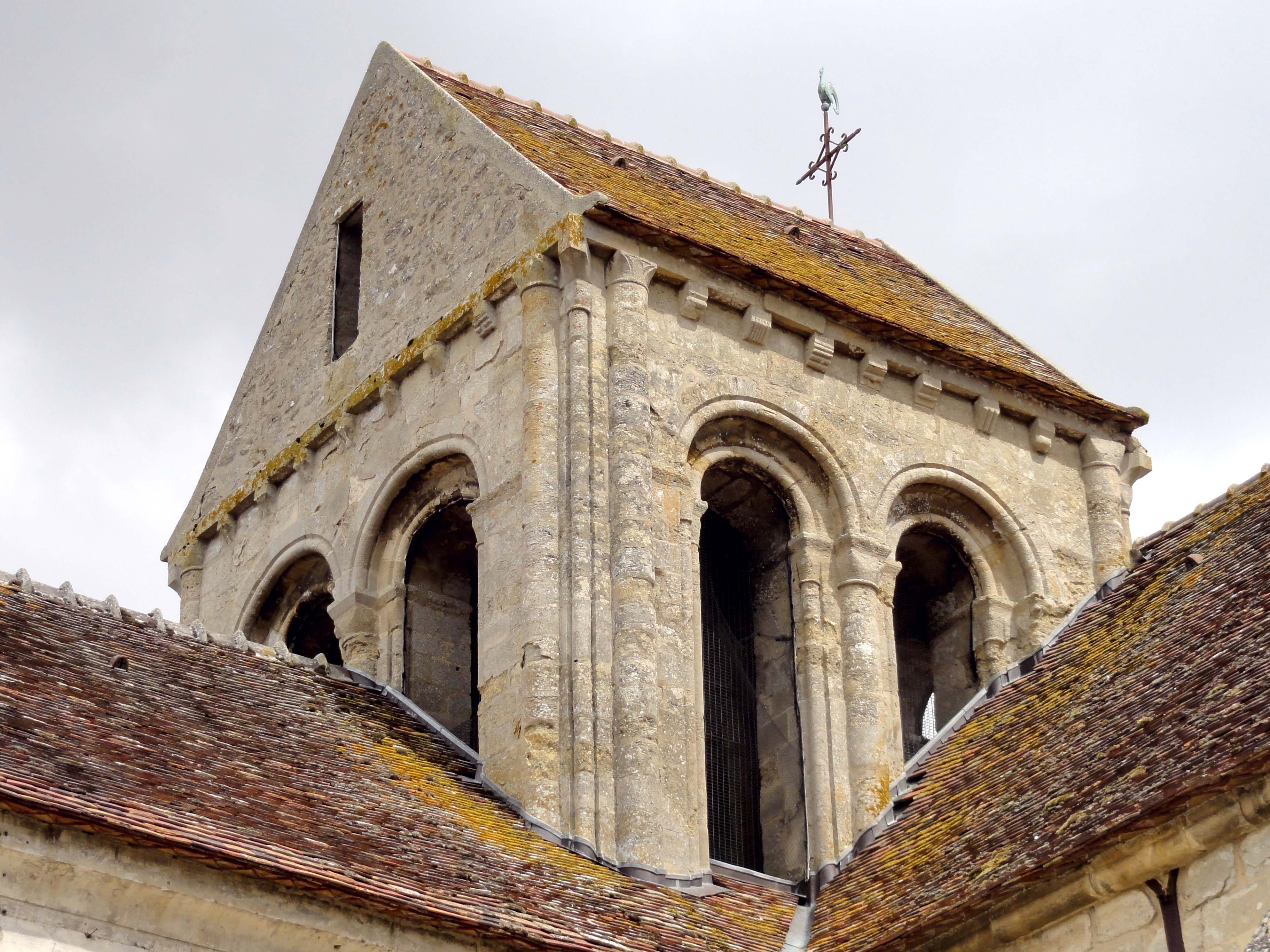 Église Saint-Sulpice de Seraincourt - voir titre.